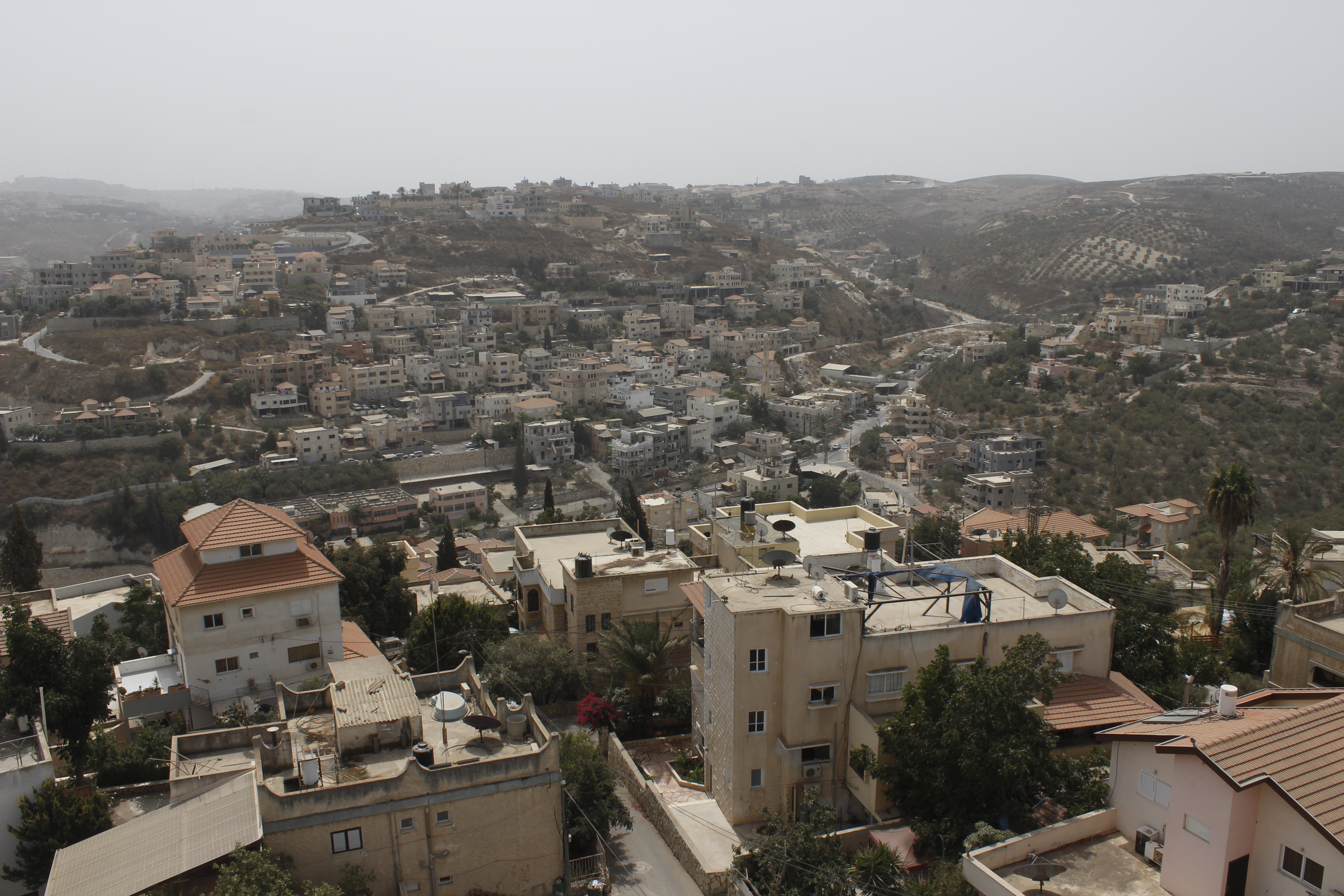 قرية مشيرفة